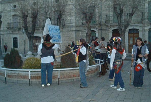 Diesta de quintos en Campaspero